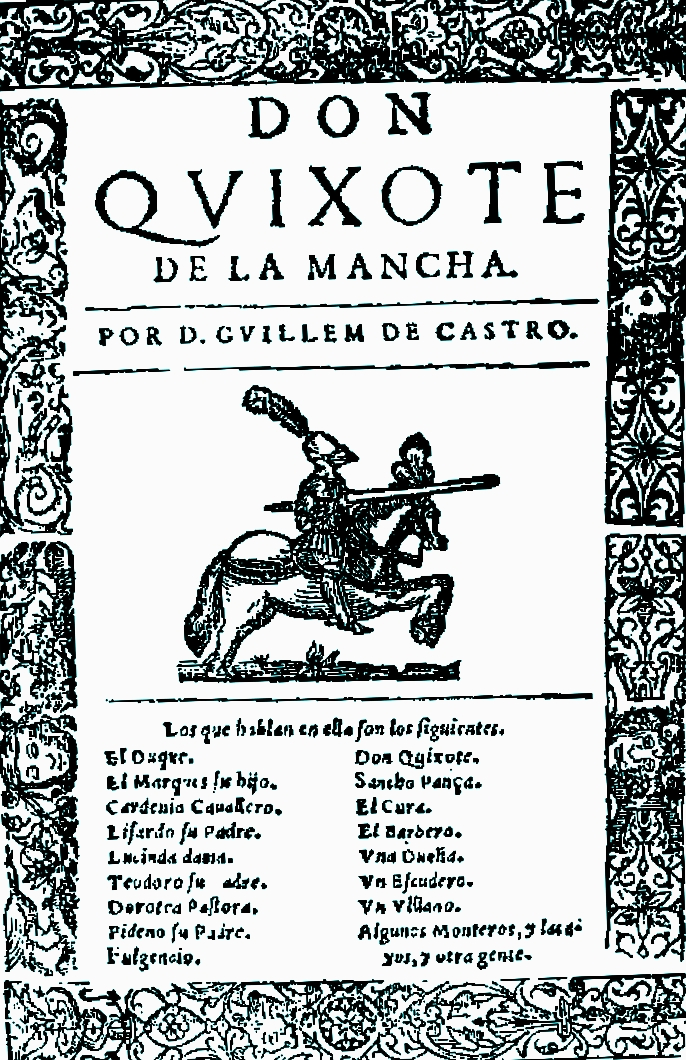 Portada de Don Quijote del siglo XVII, comedia de Guillén de Castro